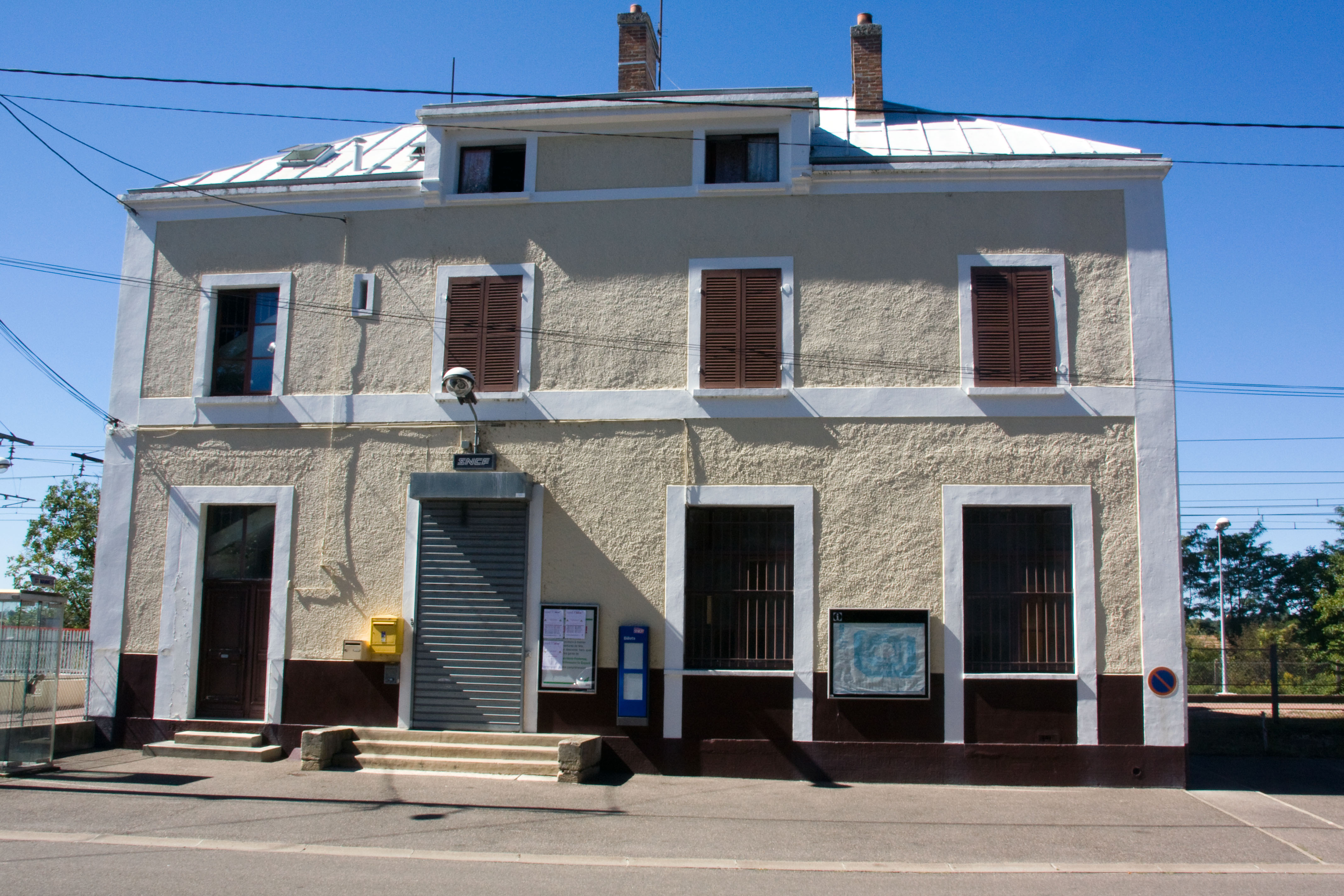 Gare de Saint-Mammès, Saint-Mammès, Seine-et-Marne, France